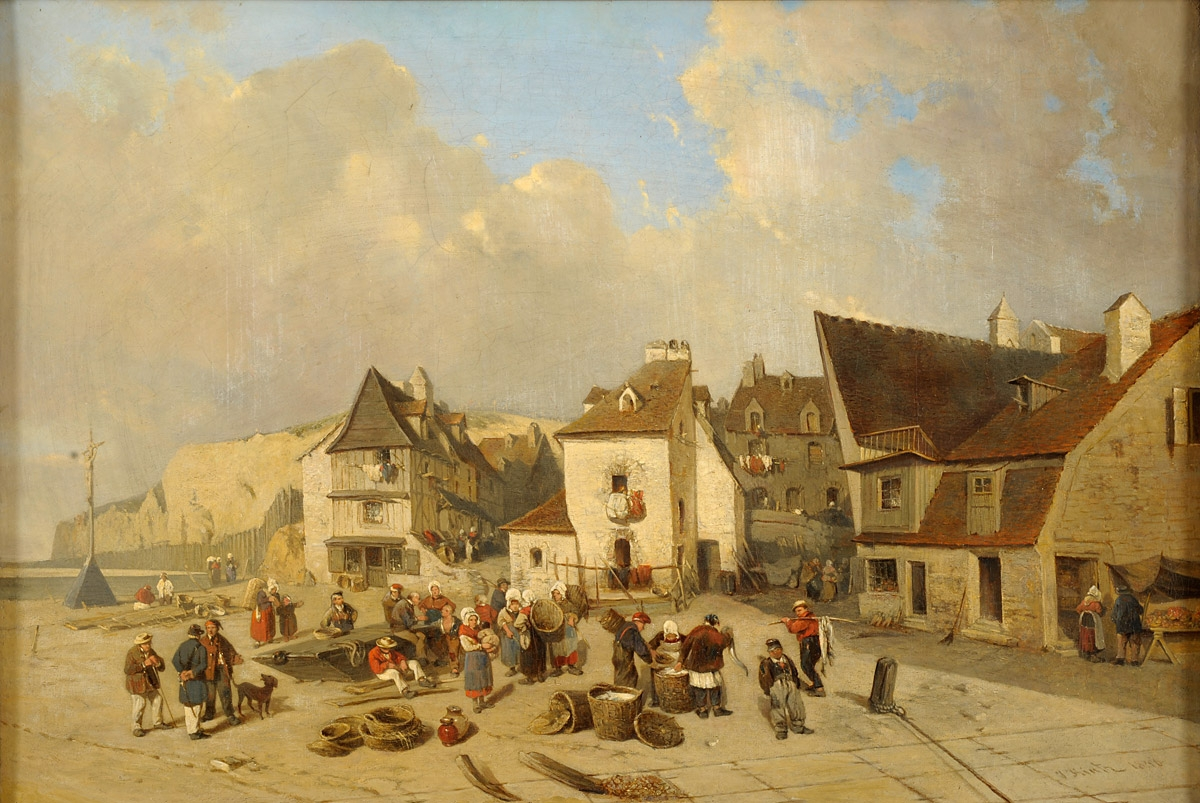 Ansicht von Dieppe. Signiert. Öl/Lwd./doubl., 55 x 80 cm